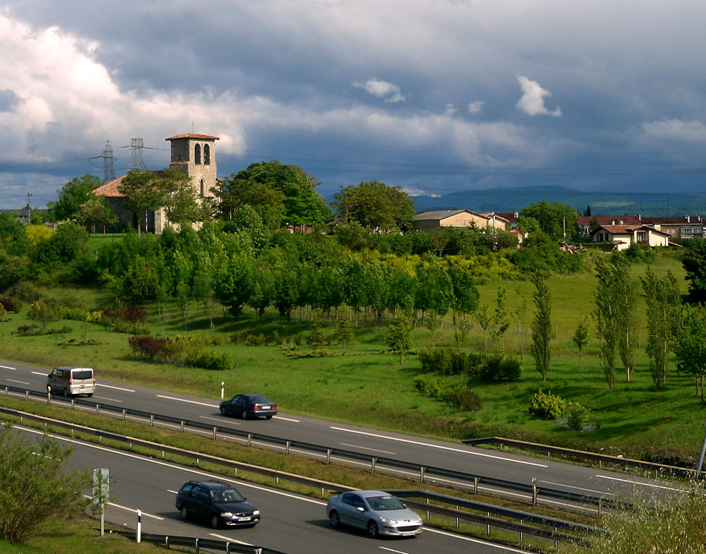 Abetxuku herria (Gasteiz) / Pueblo de Abetxuko (Vitoria)